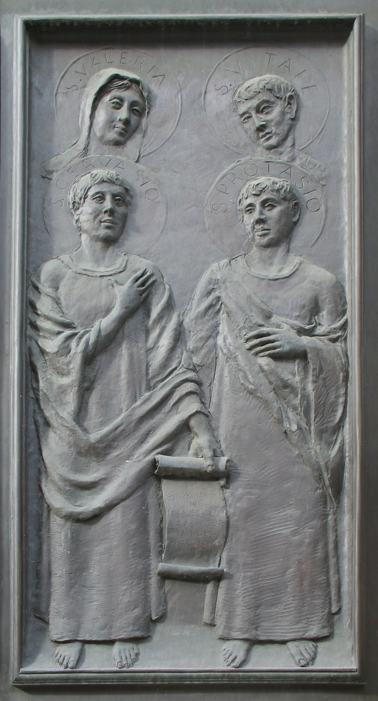 Raffigurazione dei S.S. Gervasio e Protasio nel portone della Basilica dei Santi Gervasio e Protasio di Rapallo (Italy).